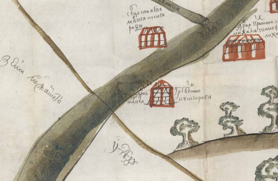 Составил в августе 1694 г. подьячий Поместного приказа Степан Золотарев" (Дело о сыске и отказе И. Б.Троекурову п. Харланово и Коняево в Городском стане)."